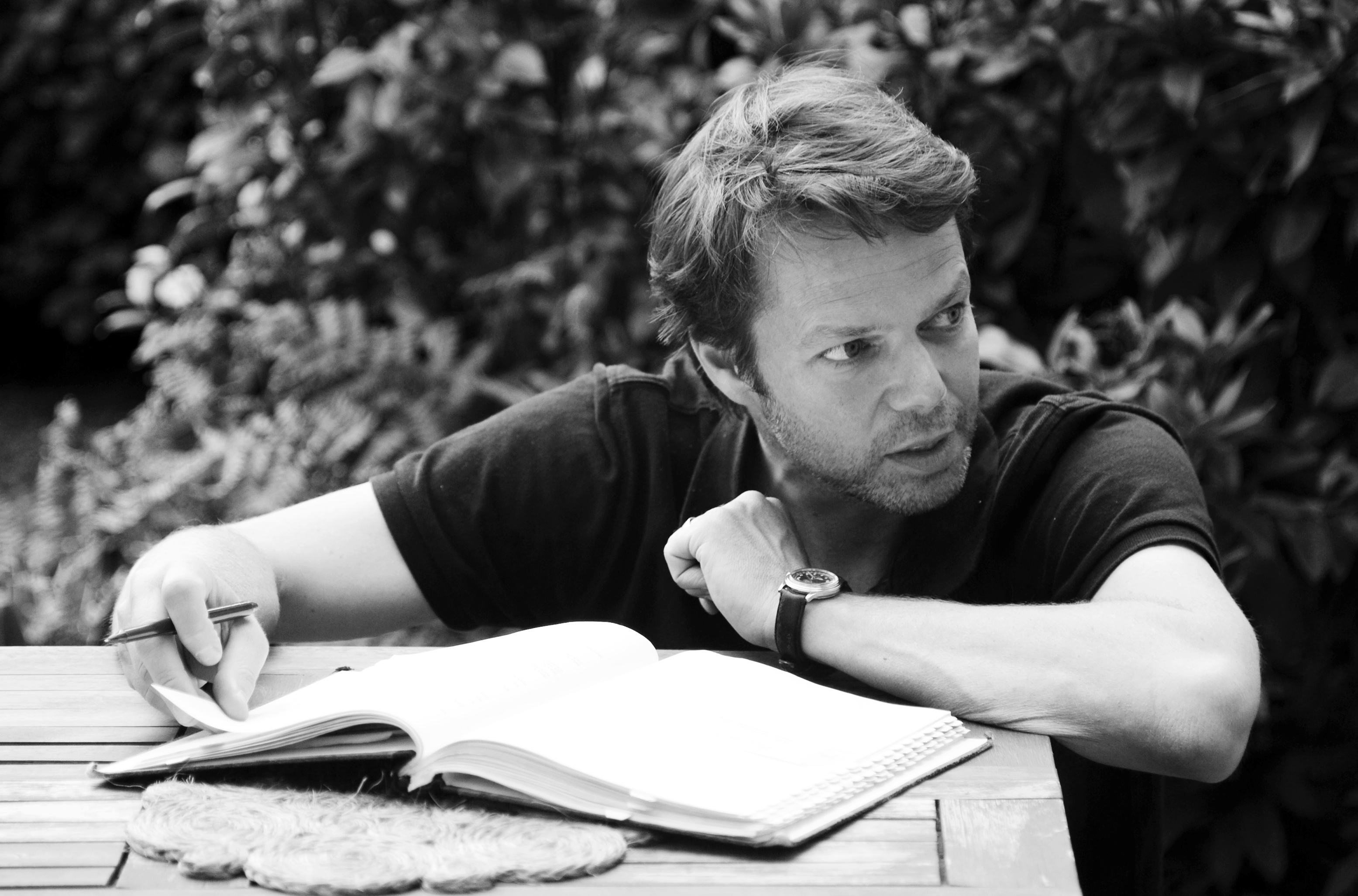 Hans-Christian Schmid bei Dreharbeiten zu WAS BLEIBT